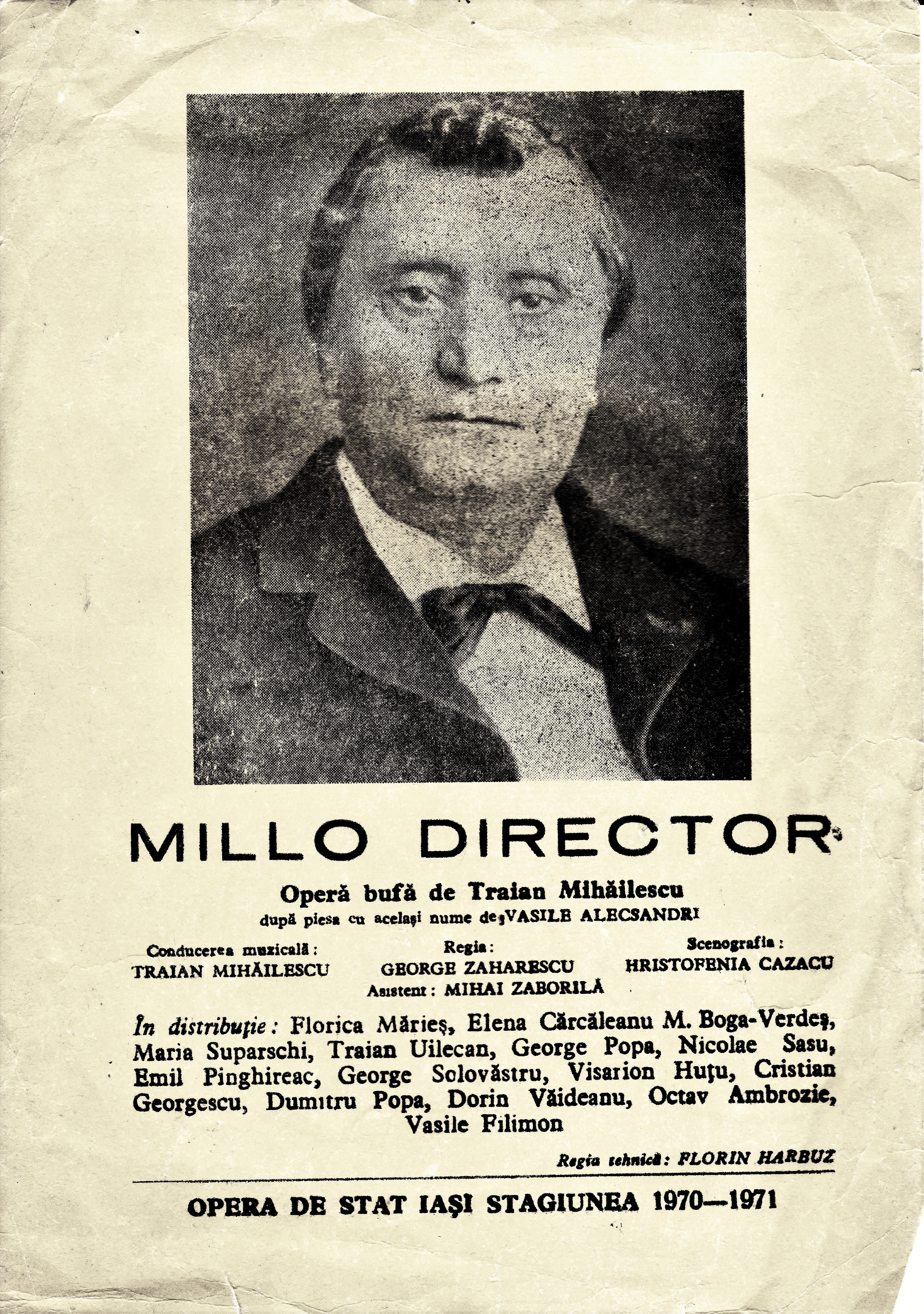 Afis premiera „Millo Director" Opera de Stat Iași